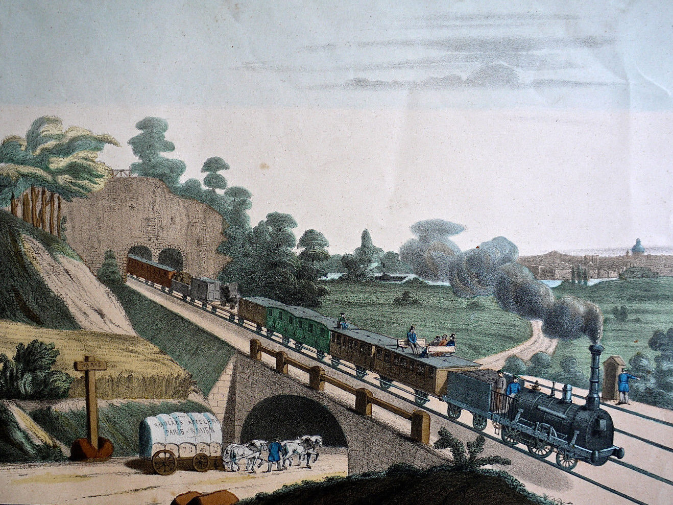 Éditeur : L. Hachette (Paris) Date d'édition : 1848 Type : monographie Droits : domaine public Identifiant : ark:/12148/bpt6k889475k Source : Bibliothèque nationale de France, département Littérature et art, V-32772